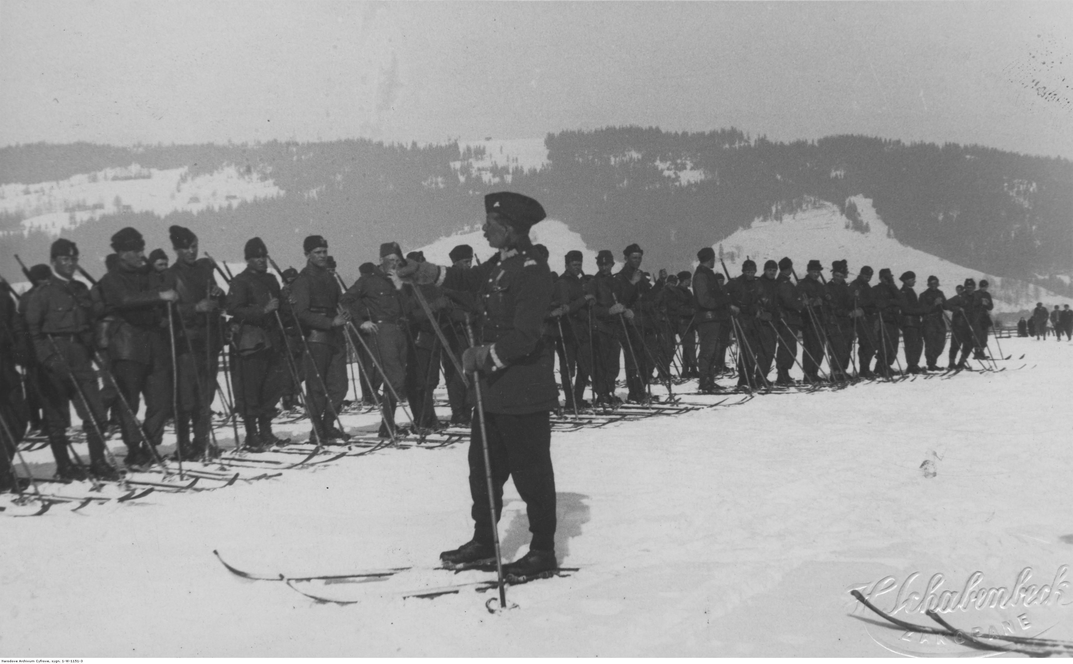 Szkoła wysokogórska przy 21 Dywizji Piechoty Górskiej w Zakopanem. Gen. bryg. Wacław Przeździecki omawia ćwiczenia; marzec 1928. Koncern Ilustrowany Kurier Codzienny - Archiwum Ilustracji. Sygnatura: 1-W-1151-3